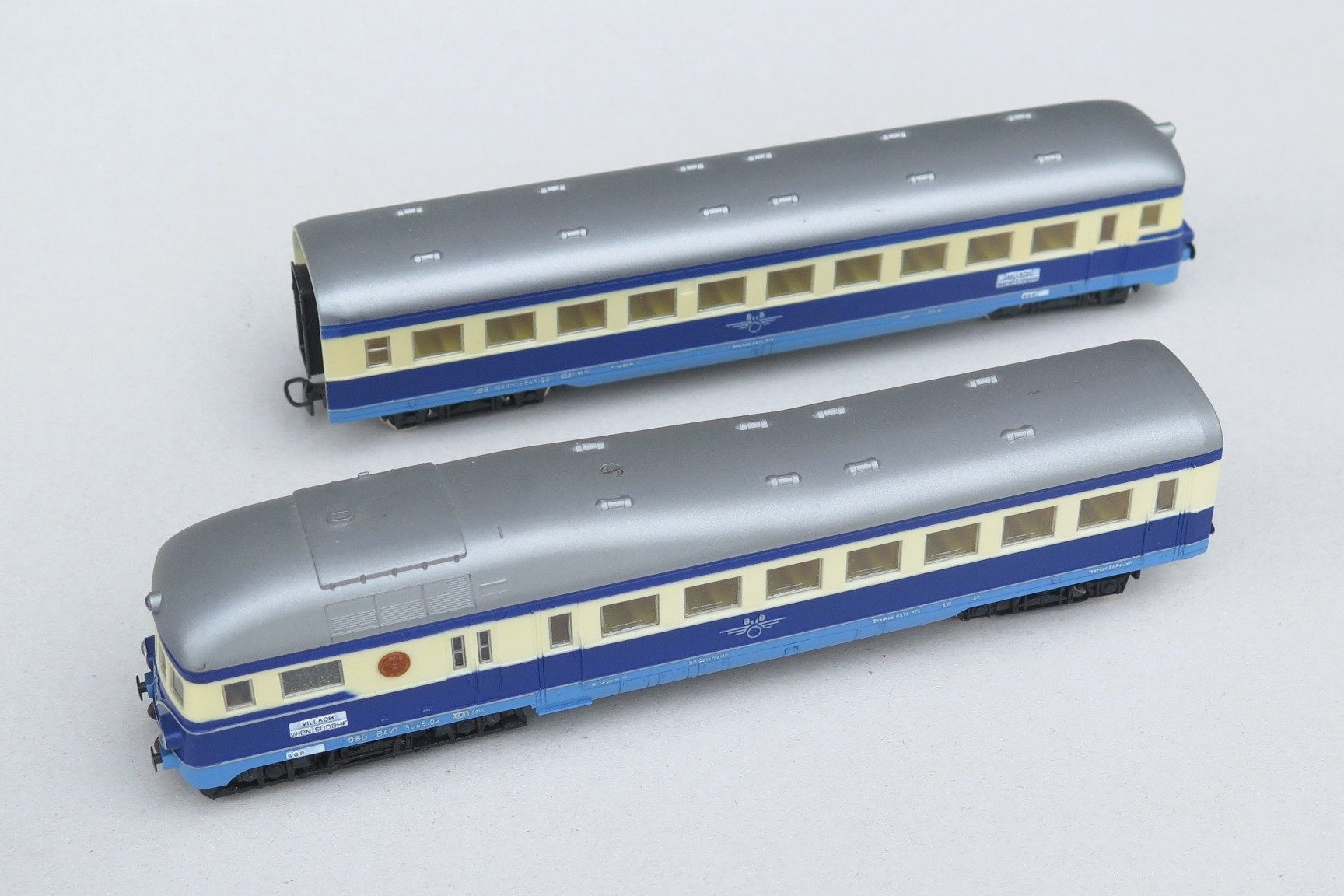 Kleinbahn Schnellzug Dieseltriebzuges der Baureihe 5045 Blauer Blitz der Österreichischen Bundesbahnen (ÖBB).